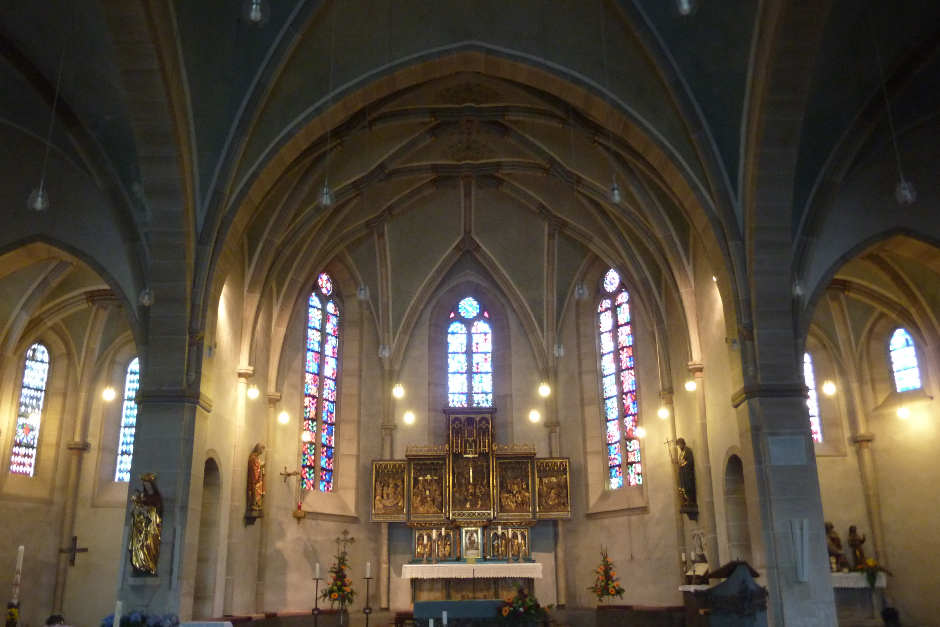 Chor der katholischen Pfarrkirche St. Johannes der Täufer in Adenau